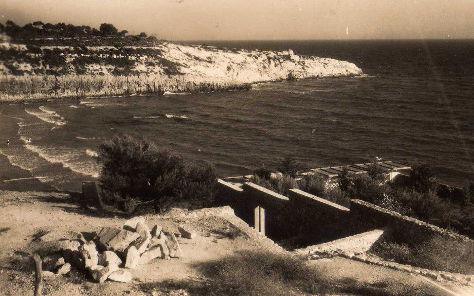 Costa Cap Salou